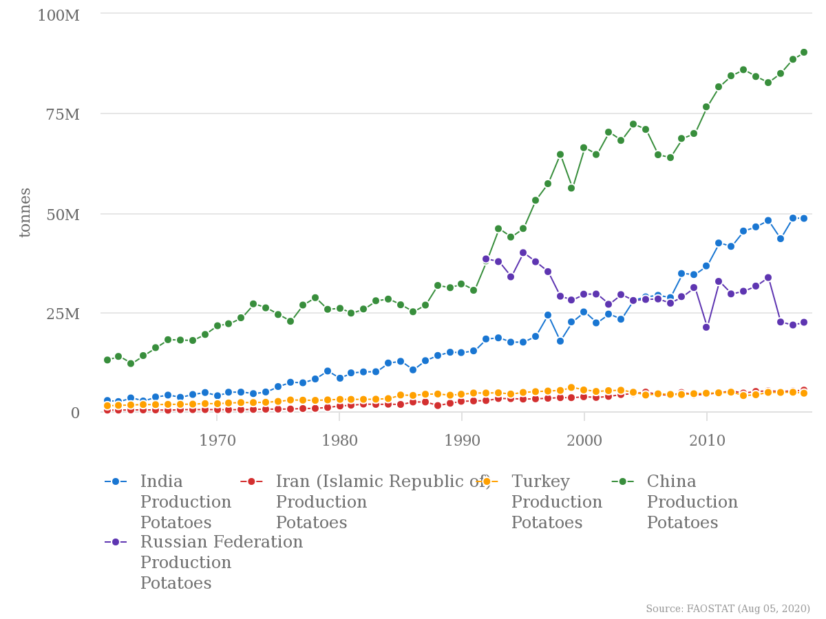 تولید سالیانه سیب زمینی